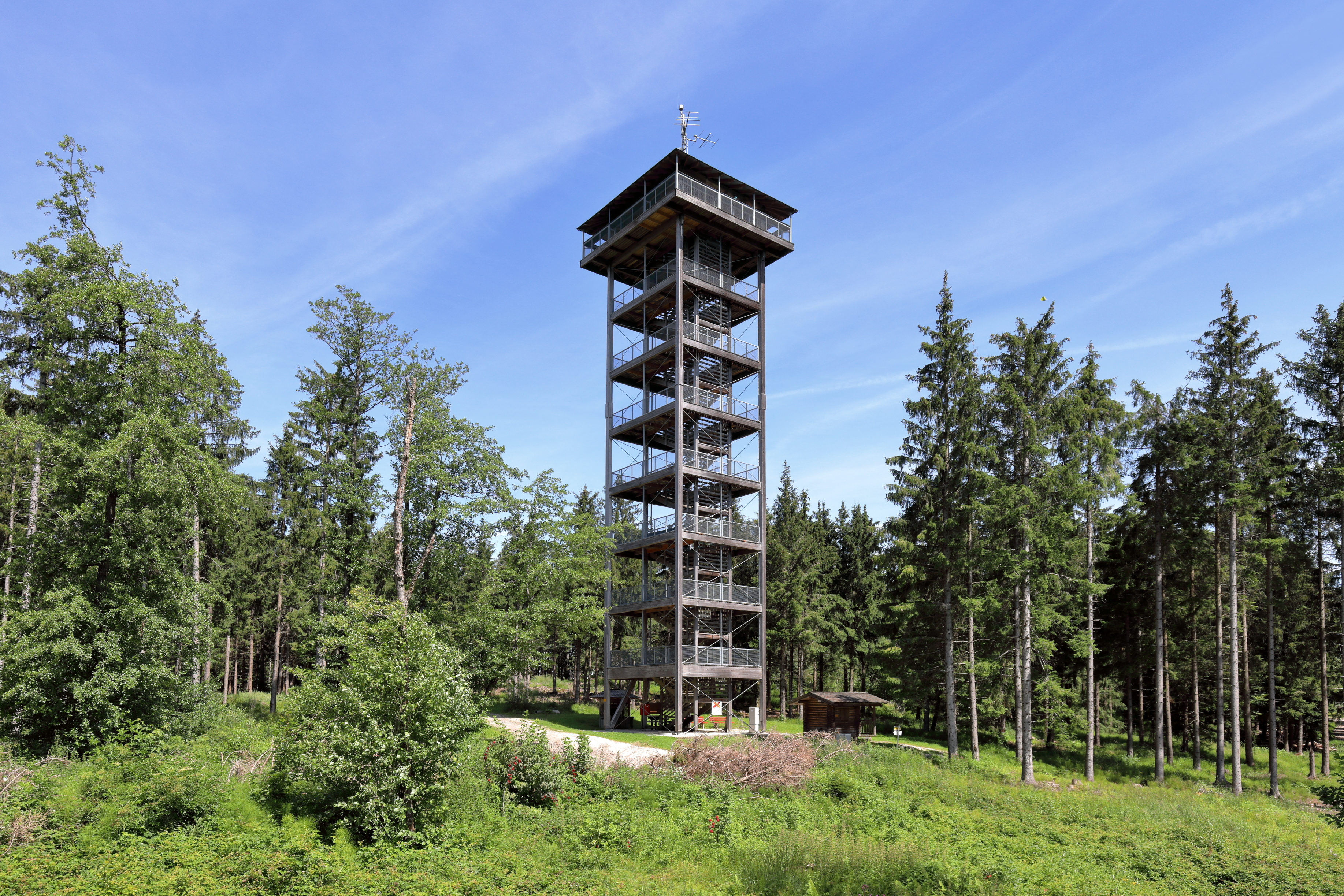 Südansicht des Attergauer Aussichtsturmes auf dem 885 m hohen Lichtenberg in der oberösterreichischen Gemeinde Straß im Attergau.Die aus Lärchenholz errichtete Aussichtswarte ist ohne Eintritt und ganzjährig begehbar, befindet sich rd. 200 m südwestlich des Gipfels und wurde am 5. Oktober 2003 eröffnet. Sie hat 8 Plattformen, deren oberste auf einer Höhe von 32 m Höhe liegt und die über 208 Stufen erreichbar ist.